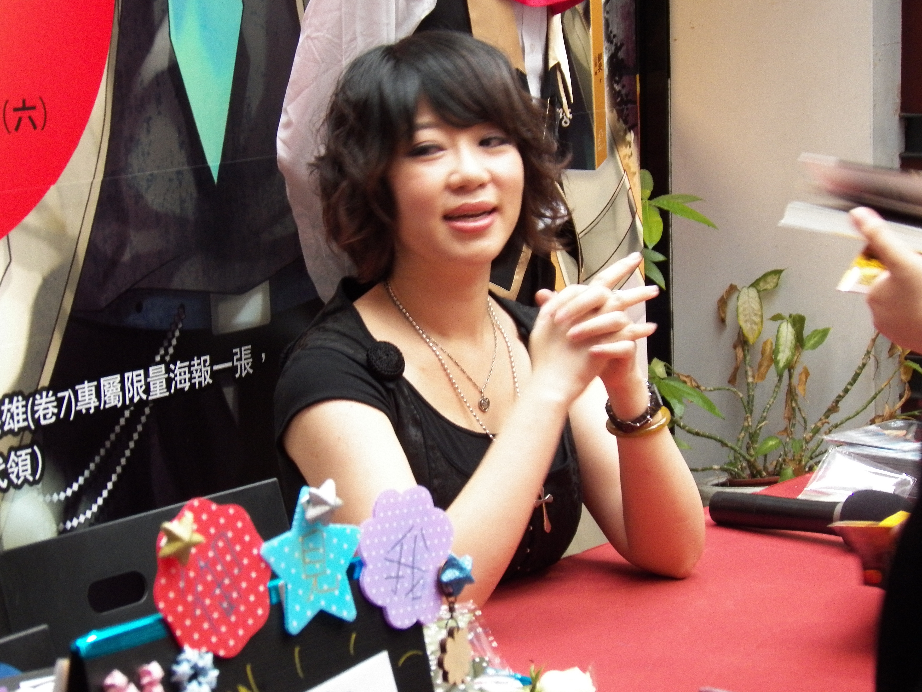 中文（台灣）: ＜非關英雄＞第七卷簽書會中的御我，攝於金石堂書店臺北汀州店。